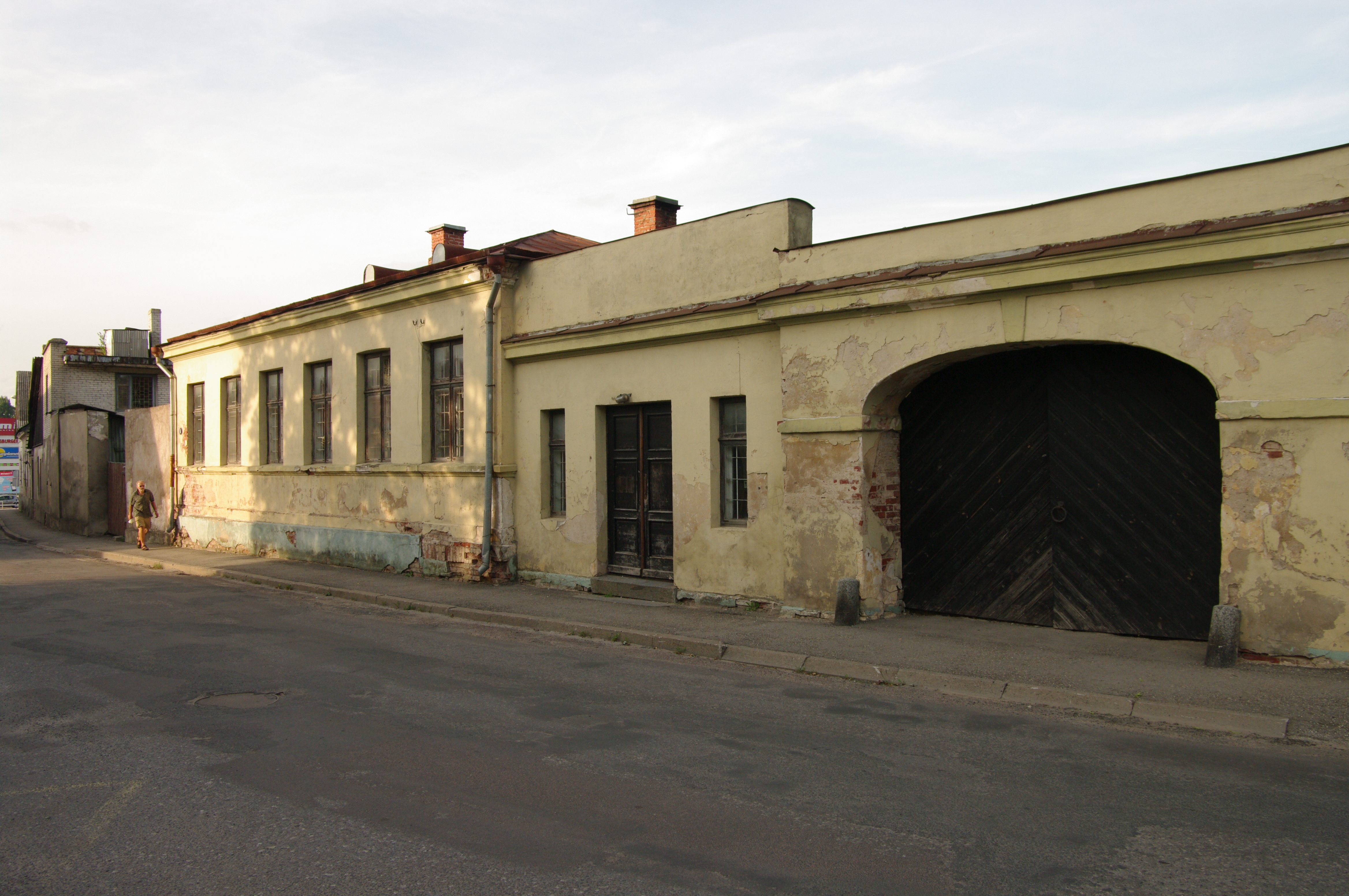 Üks väheseid 19.s. suhteliselt terviklikult säilinud taolise hoone tüübi esindajaid Valgas, mis on valdavalt säilitanud ka oma esialgse ilme.